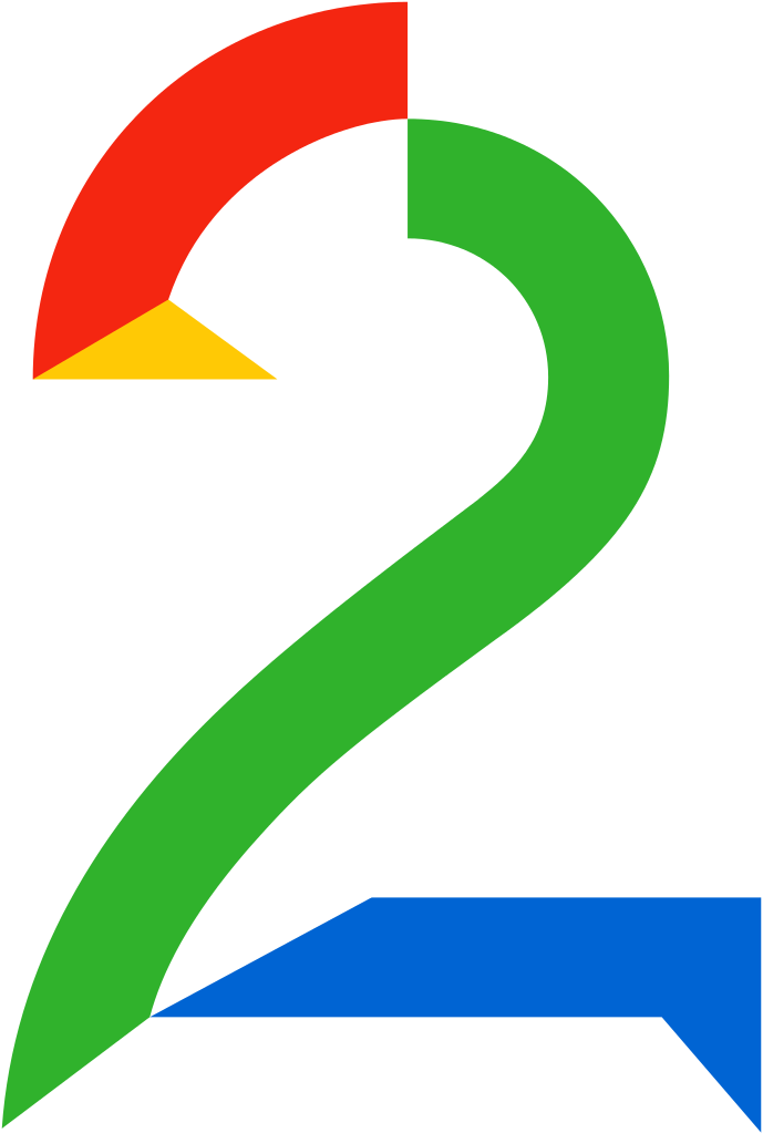 Logo for TV 2.